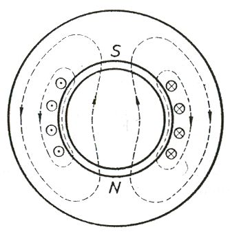 Figura 11. Makina dypolare e realizuar në formë cilindrike me ekscitim në stator.